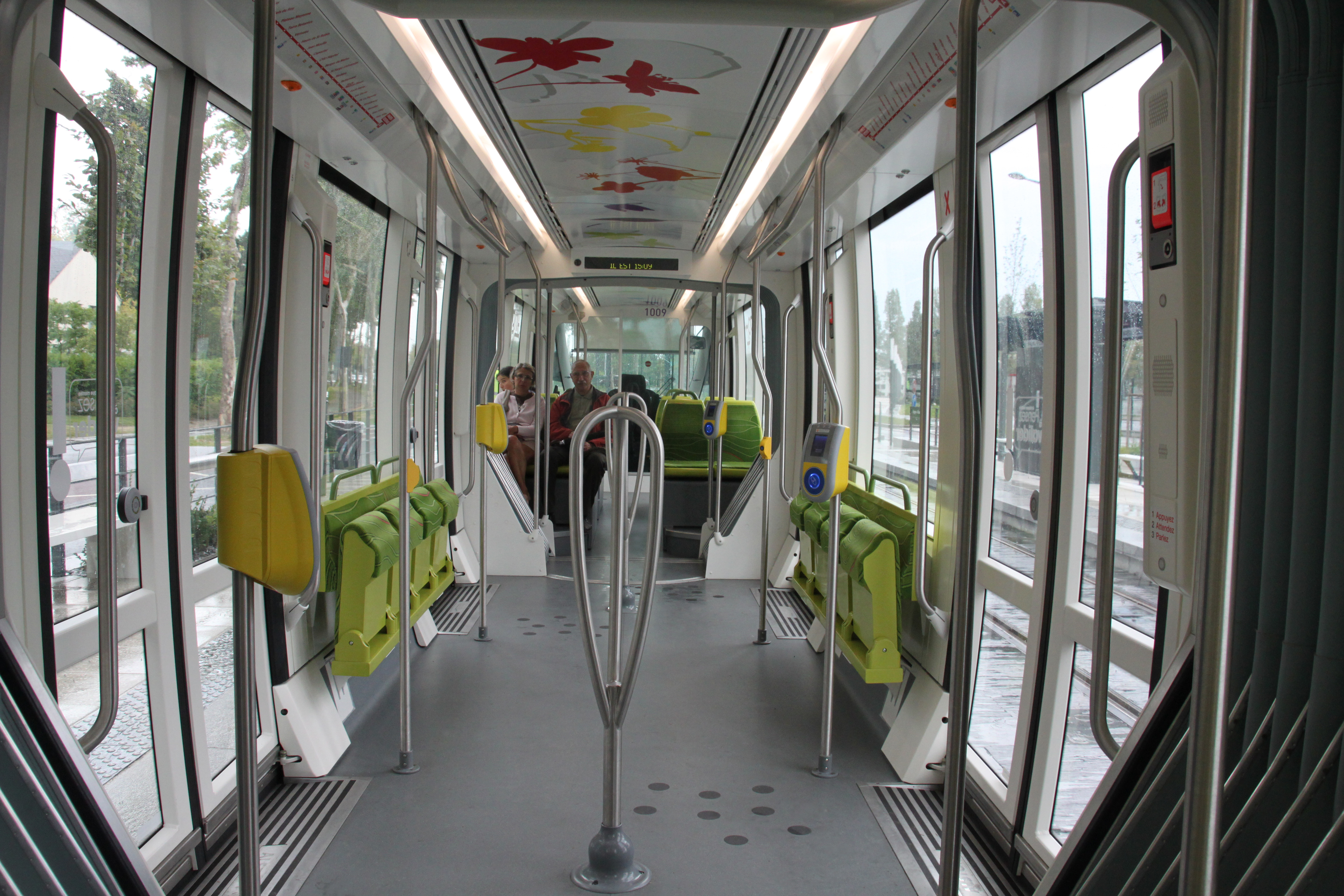 Interieur van een Citadis tram in Angers in 2011.